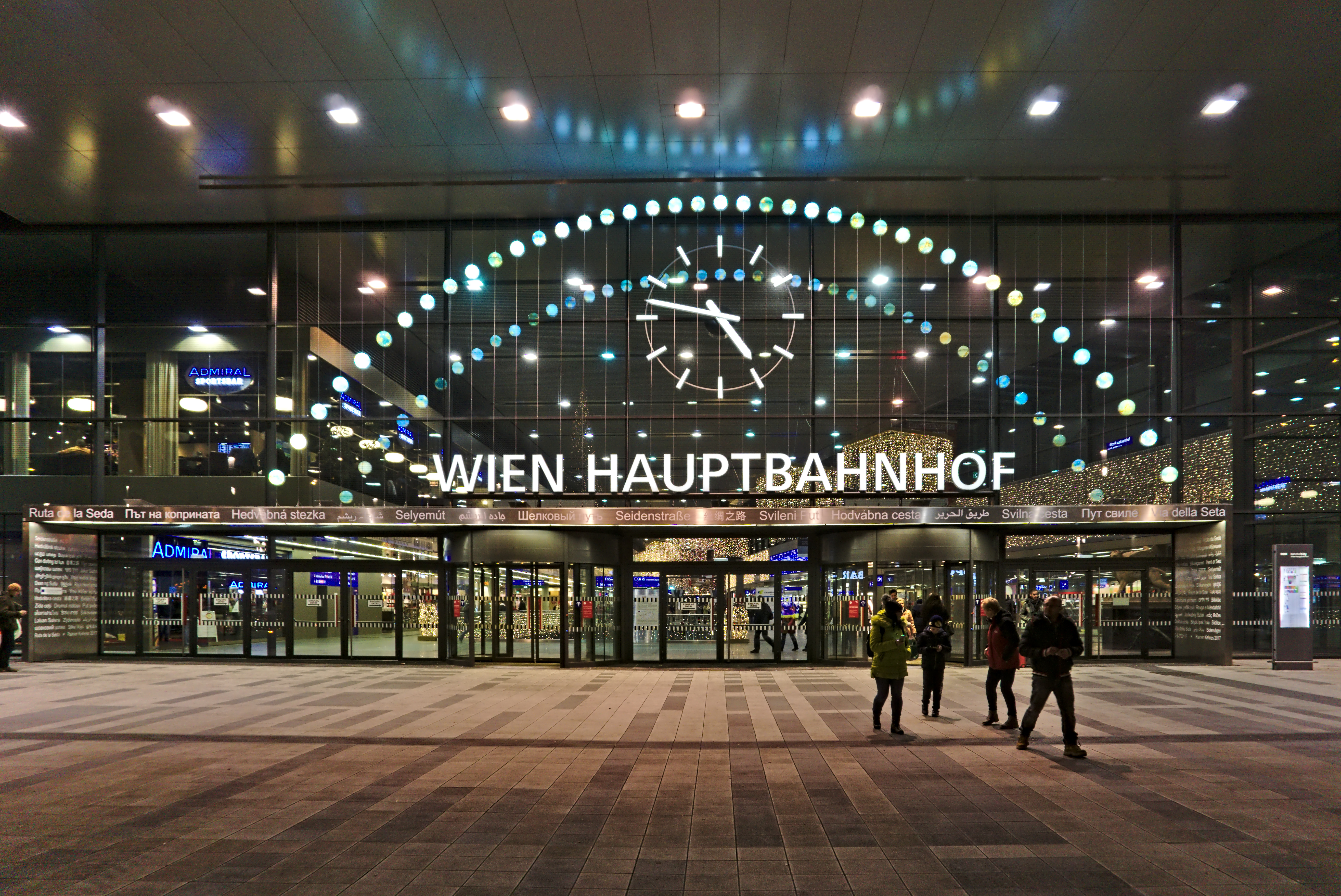 Der Haupteingang des Hauptbahnhofs Wien